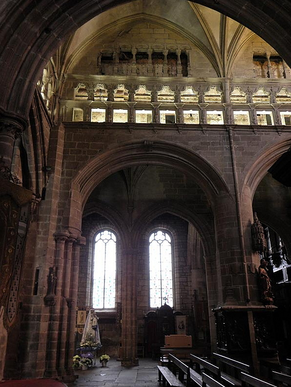 Élévation sud de la nef de la basilique Notre-Dame de Bon-Secours de Guingamp (22). .